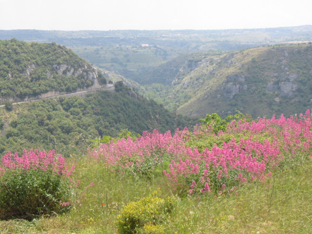 Paesaggio della Valle dell'Anapo